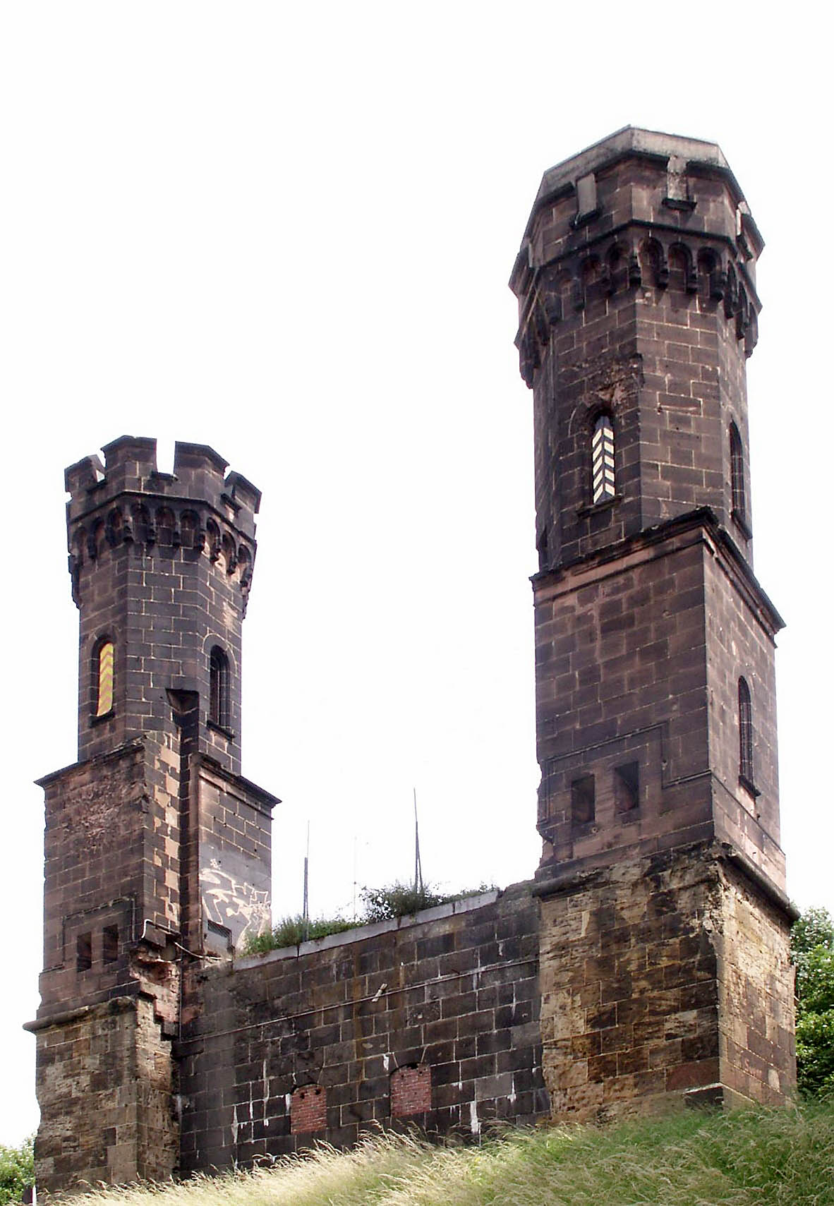 Ruine der Brückenköpfe auf der Ostseite der Hammer Eisenbahnbrücke